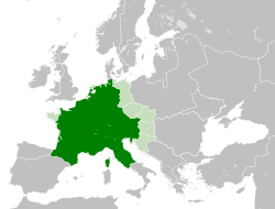 Imperio carolingio en su máxima extensión.